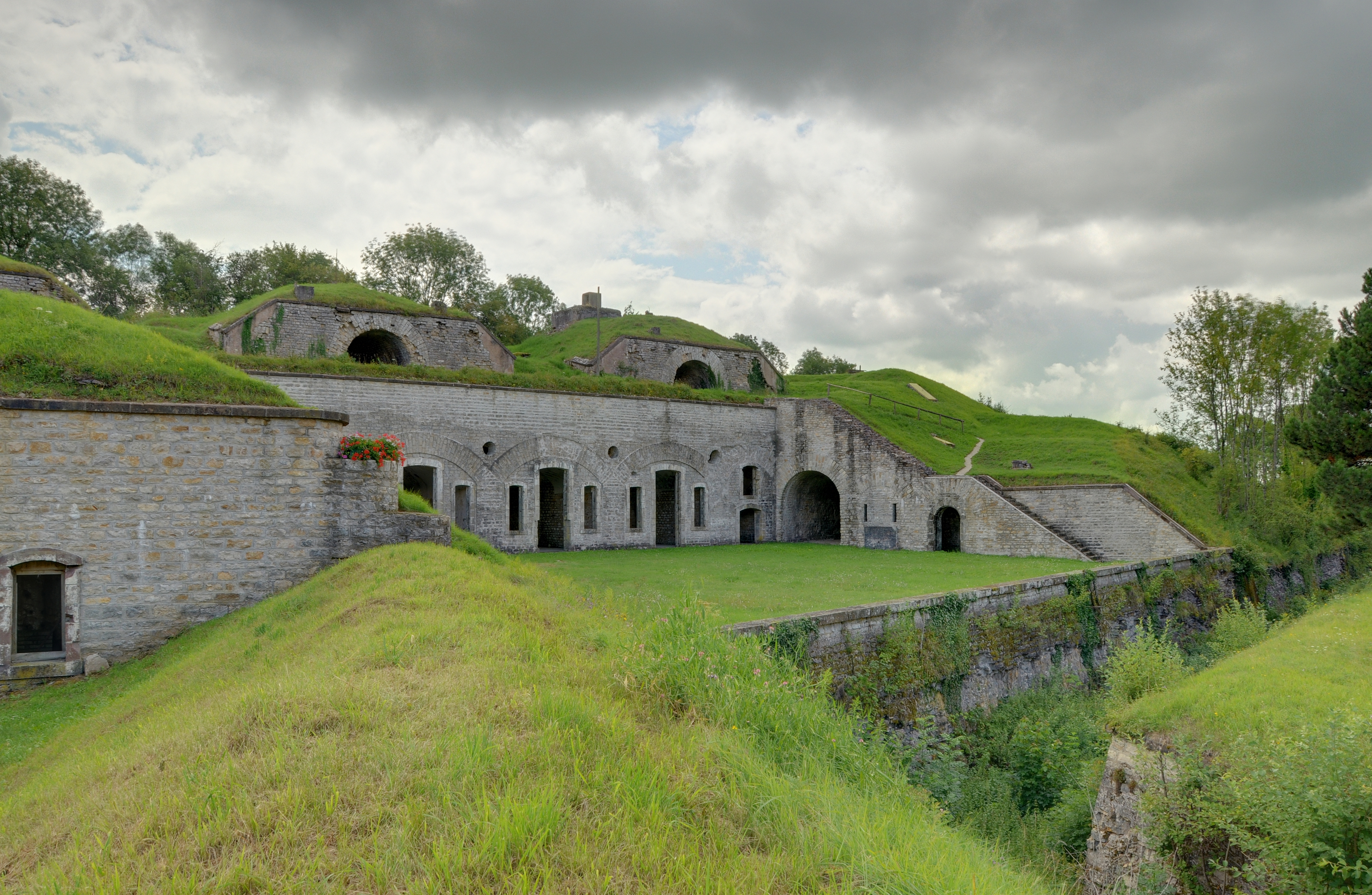 Fort des Basses Perches Basses perches fortifications.